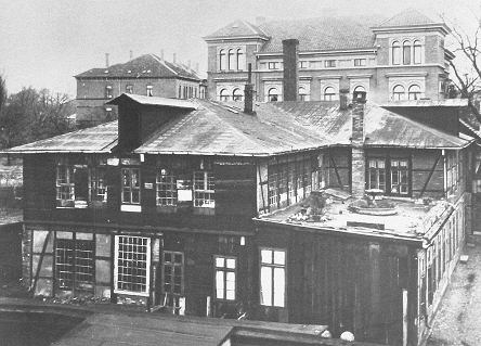 Eisenbahnsignal-Bauanstalt Max Jüdel & Co in Braunschweig, die Heinrich Büssing mit dem Kaufmann Max Jüdel als Geldgeber 1873 gründete. Ausgestelltes Foto im Heinrich Büssing Haus in Wolfsburg-Nordsteimke